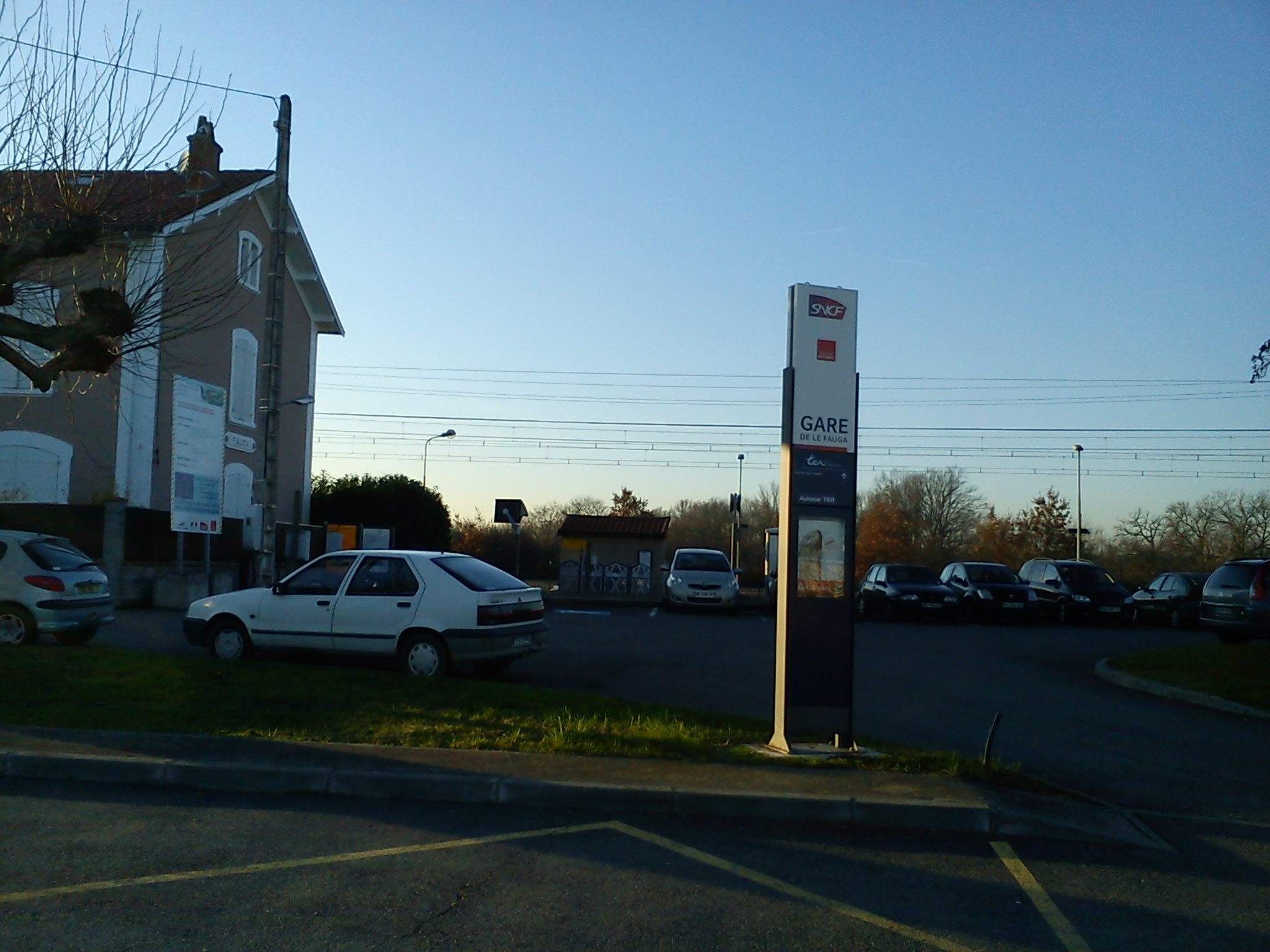 Gare du Fauga